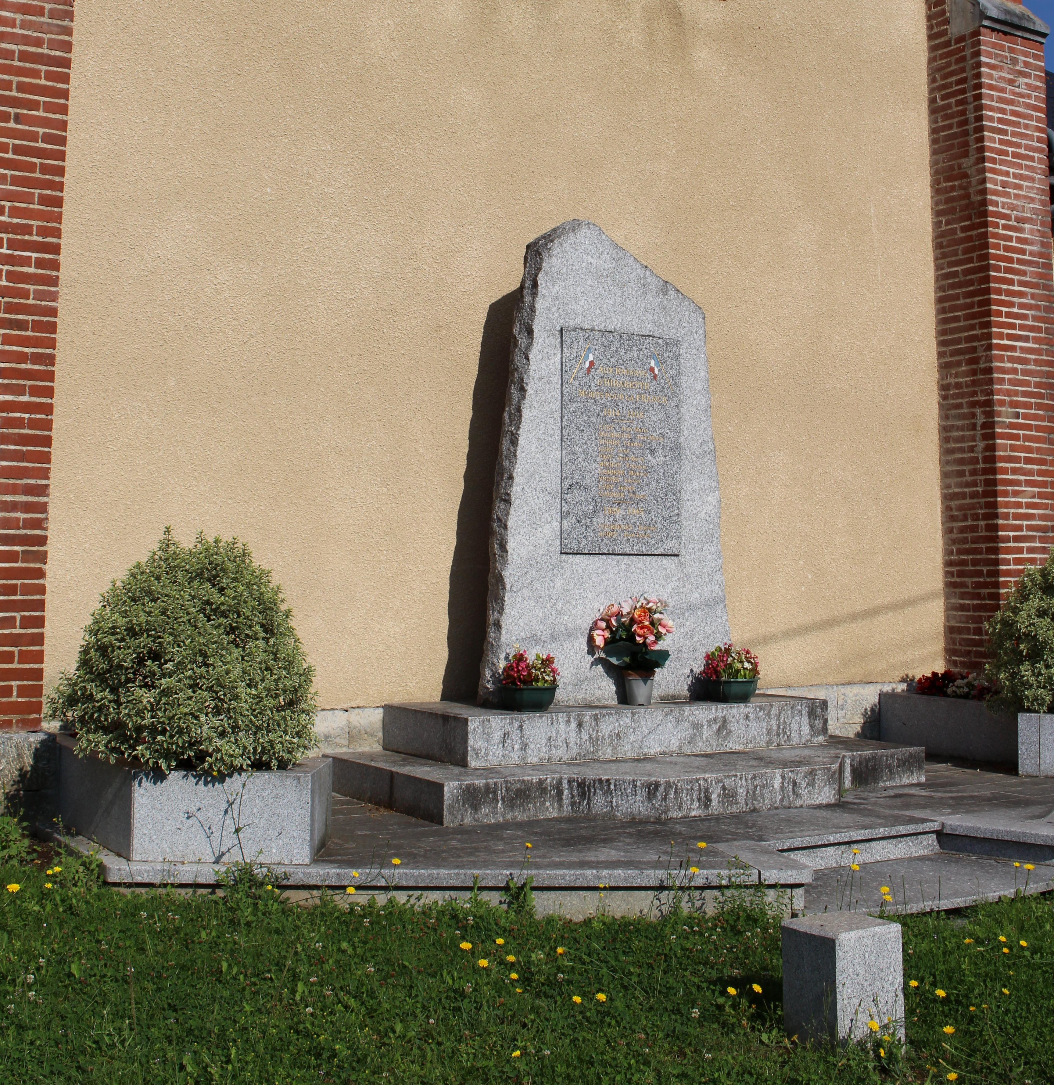 Monument aux morts de Hibarette (Hautes-Pyrénées)